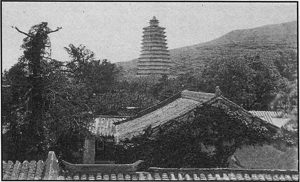 北京灵光寺招仙塔